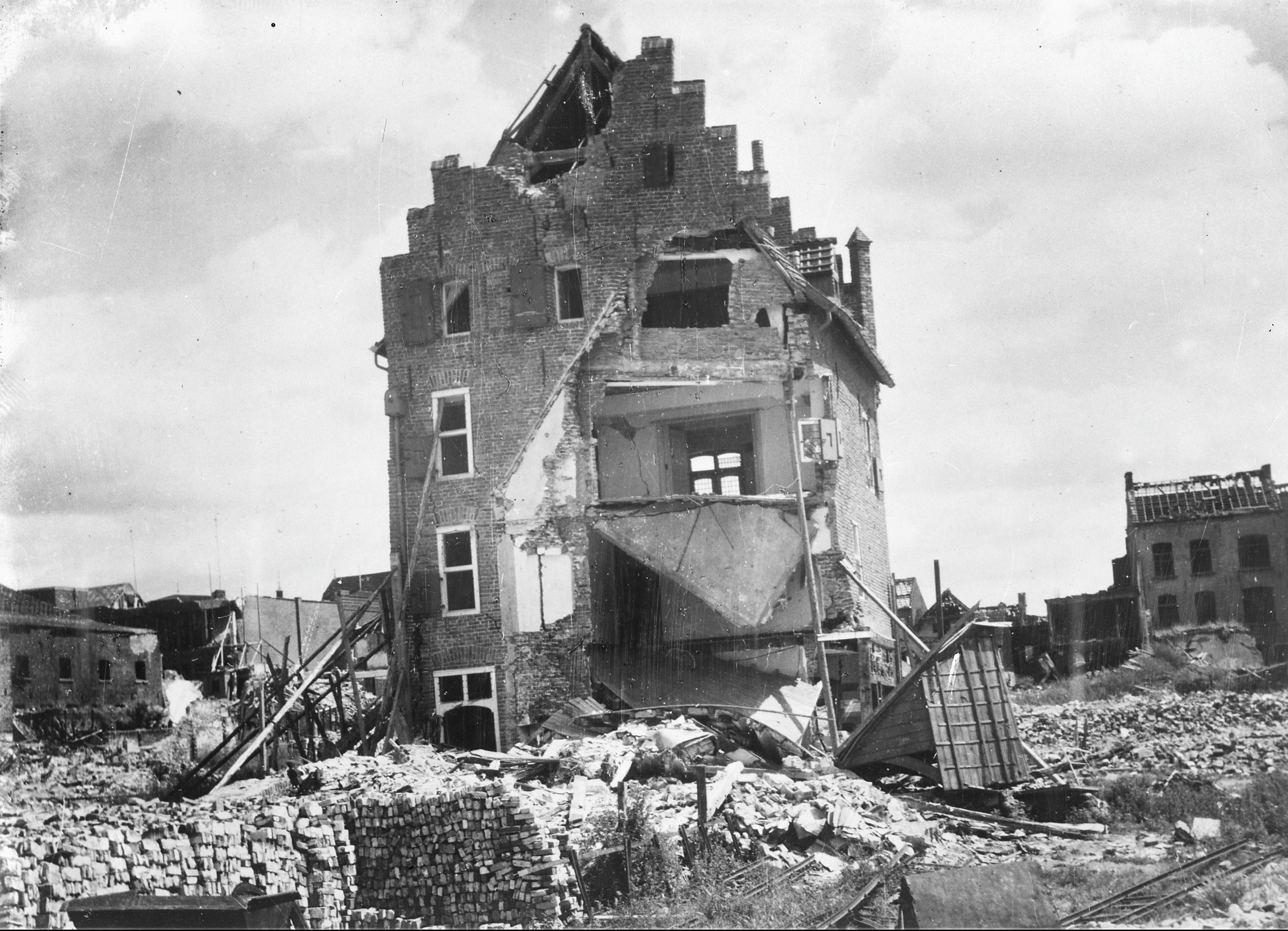 exterieur